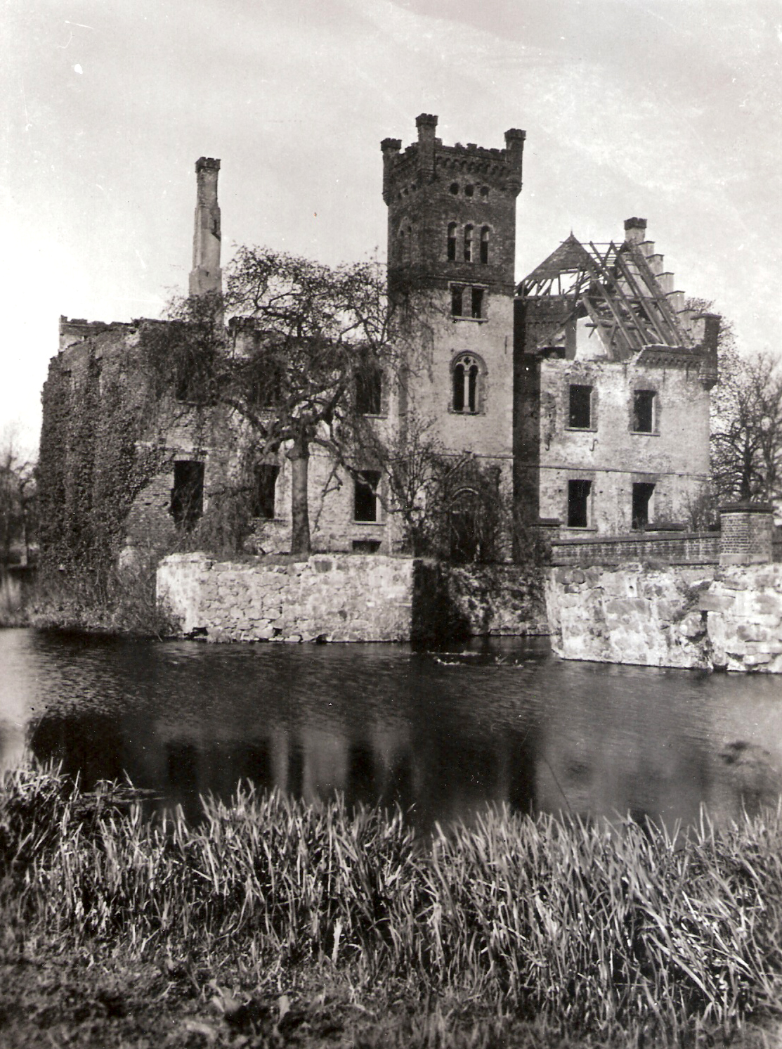 Foto